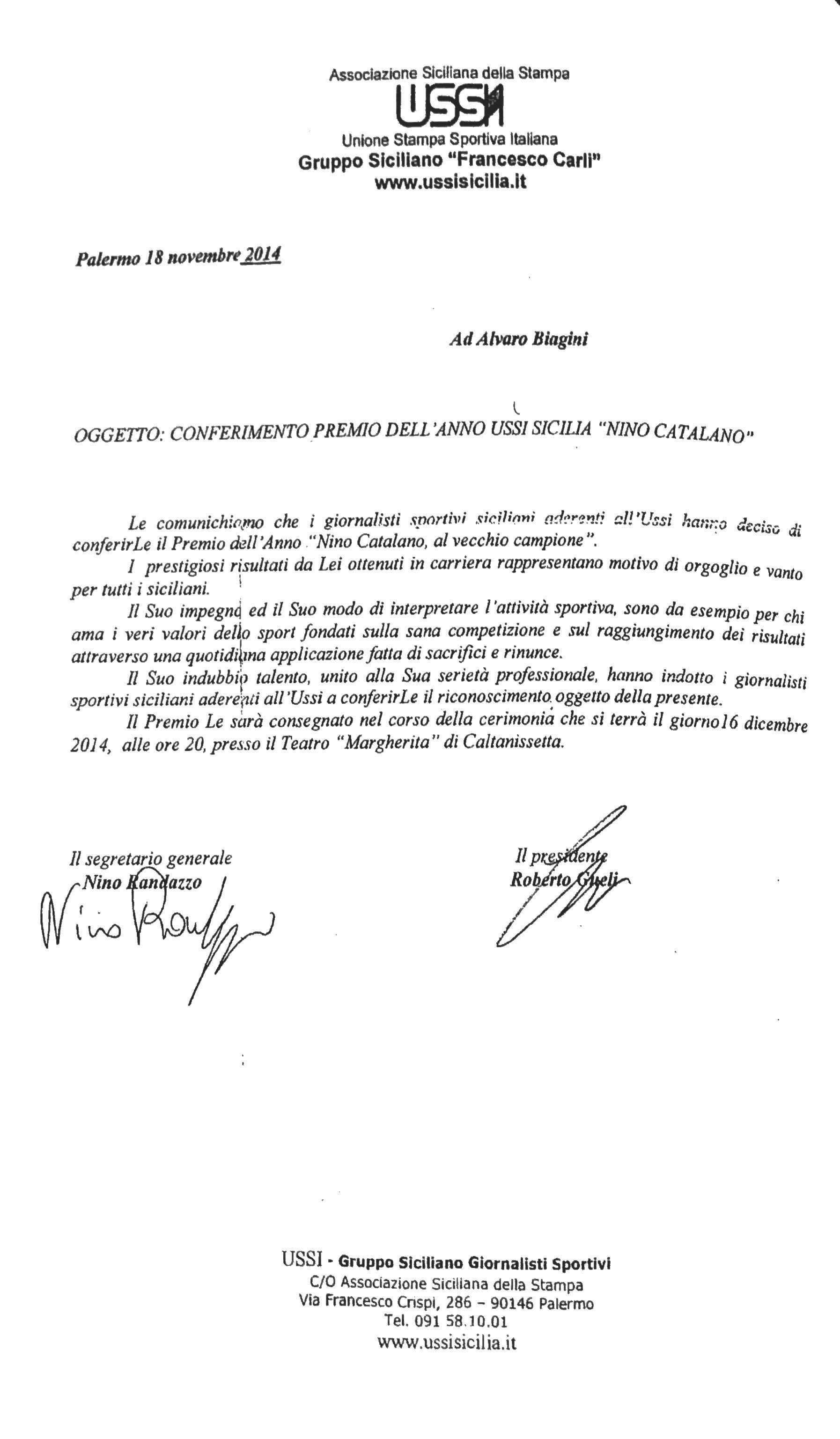 Conferimento Premio dell'anno USSI Sicilia "Nino Catalano"